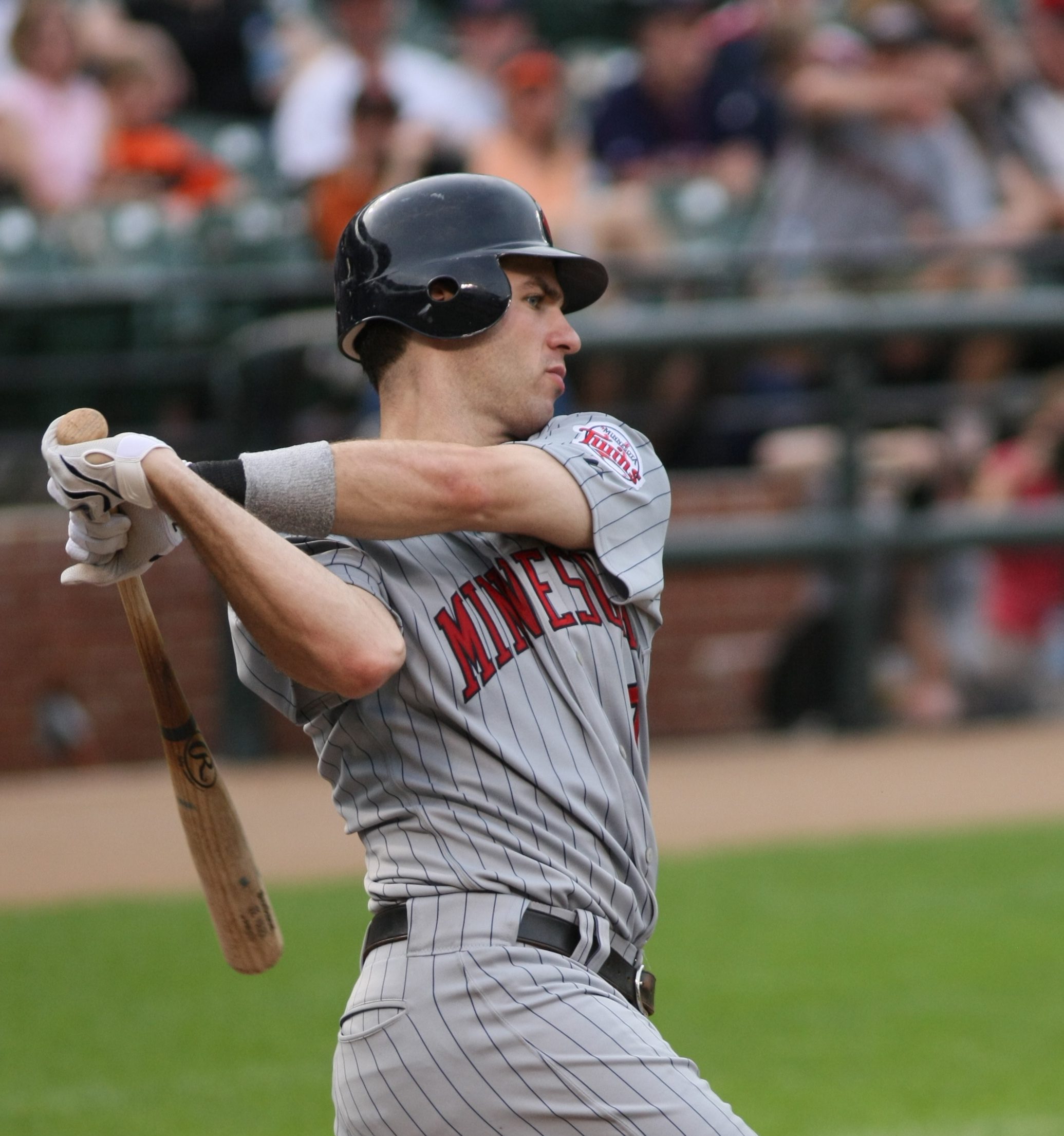 Joe Mauer